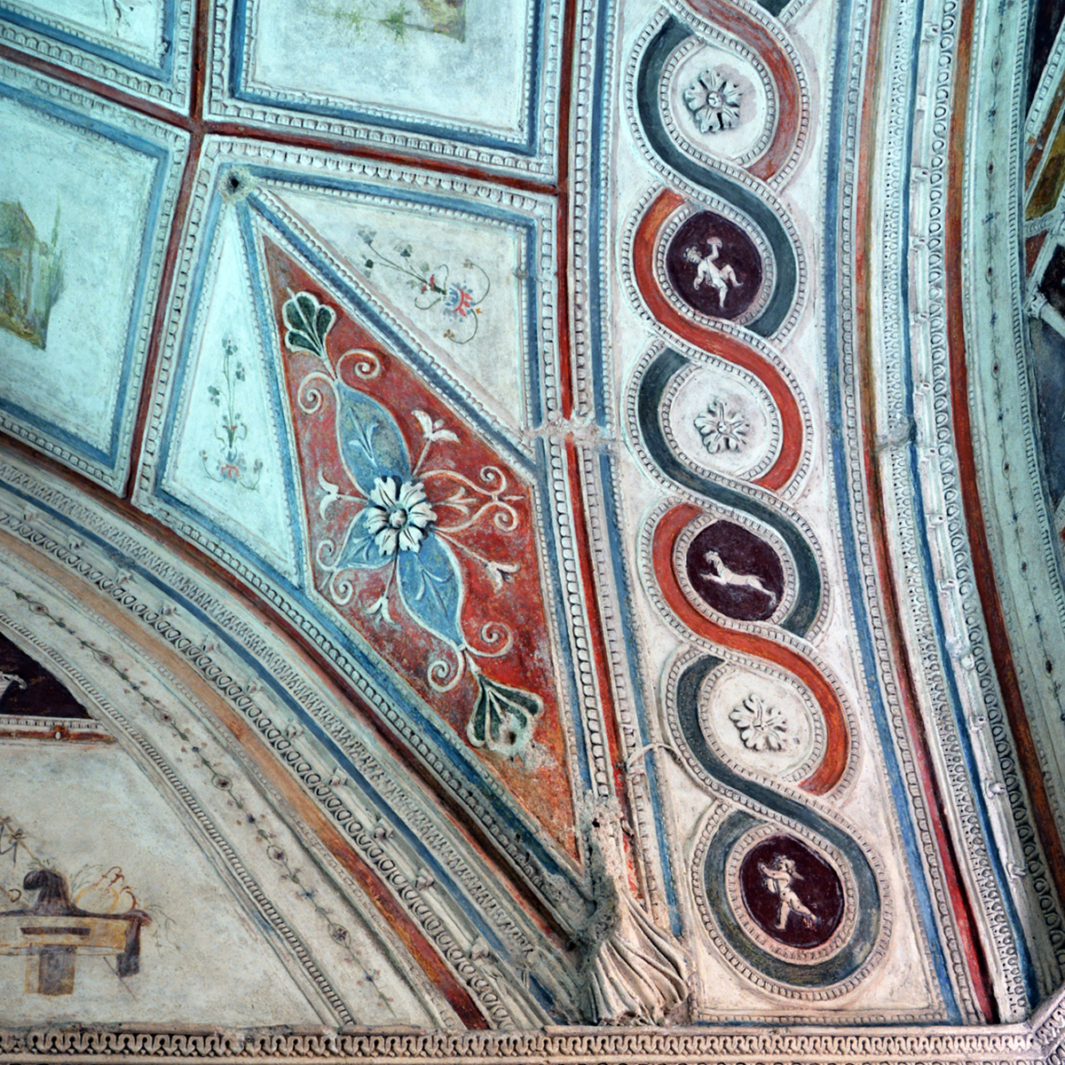 parco archeologico delle Tombe di via Latina This is a photo of a monument which is part of cultural heritage of Italy.